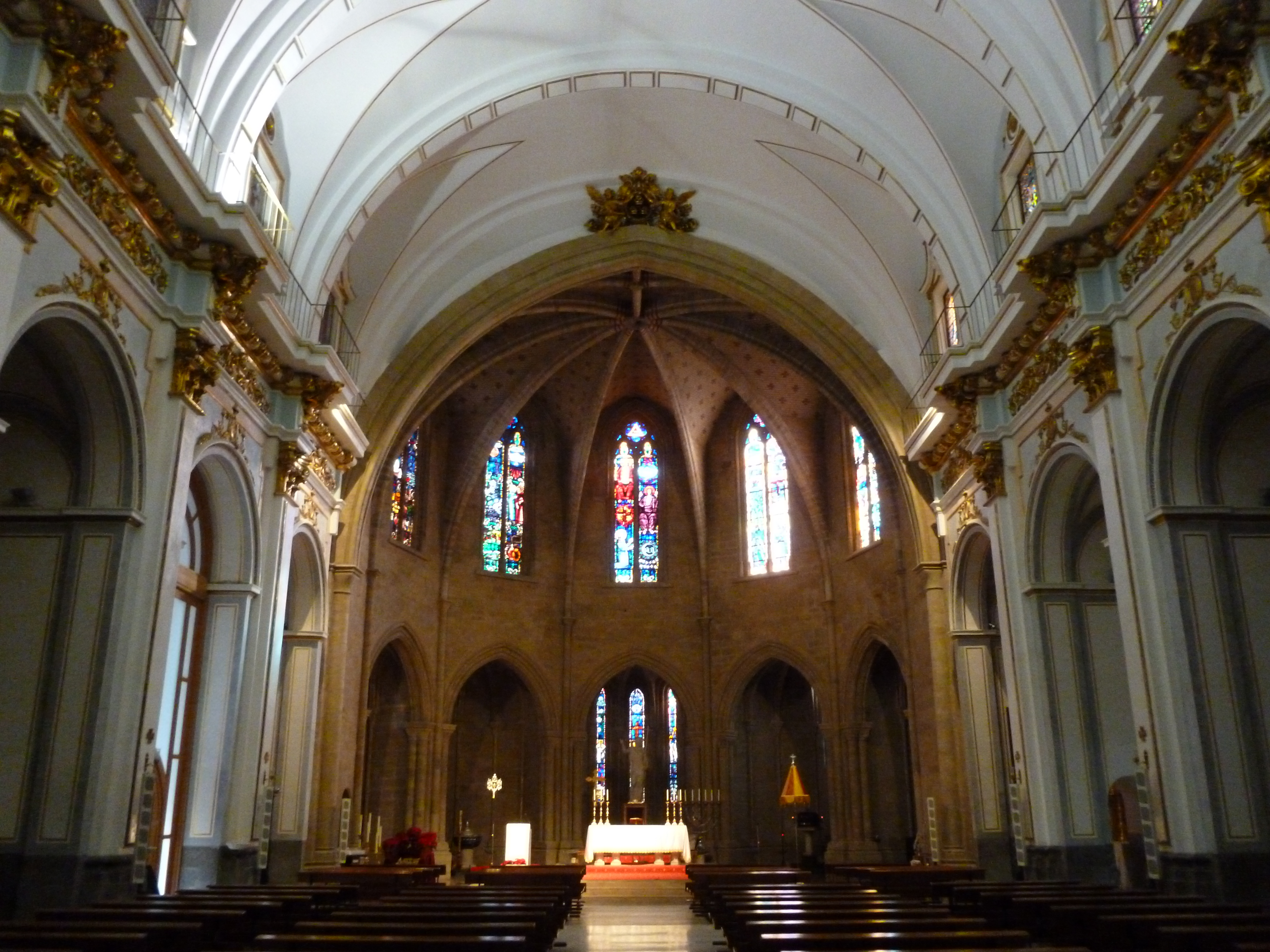 Església del Salvador de Borriana